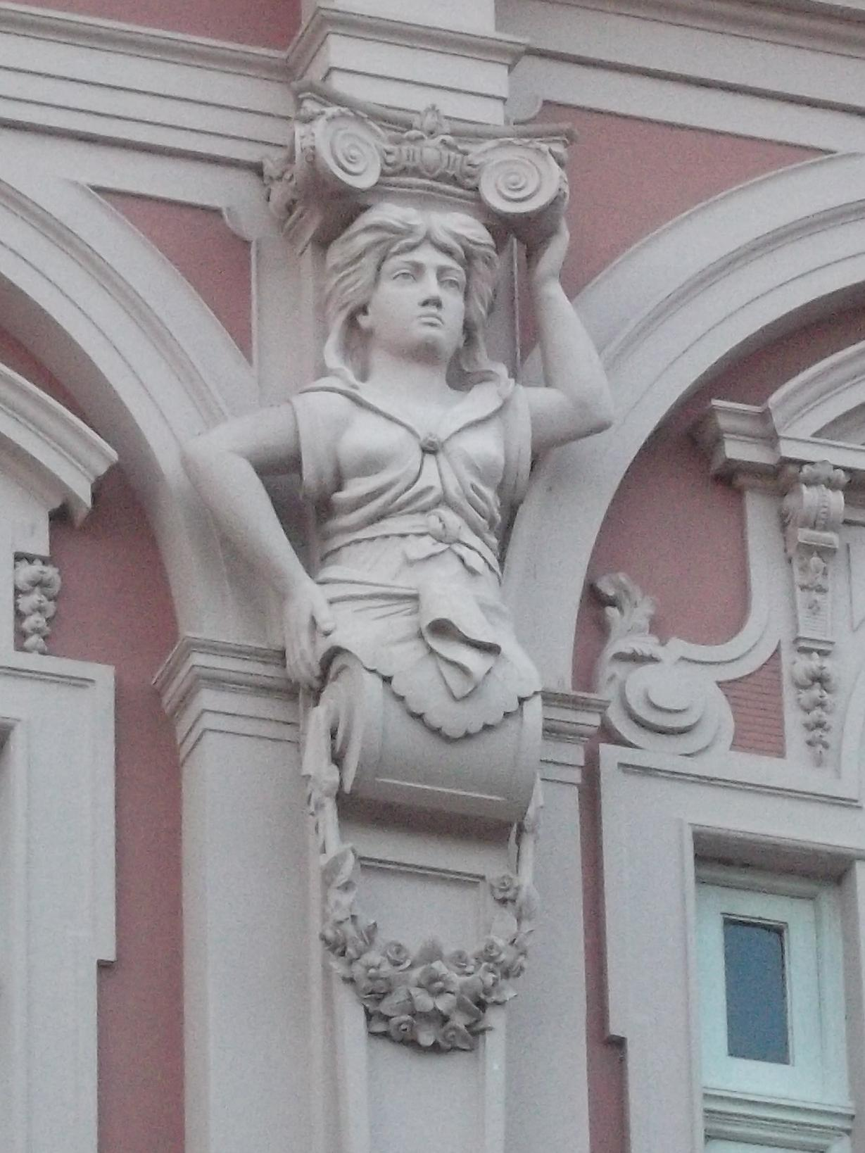 Biblioteca Pública de Pelotas, Brasil